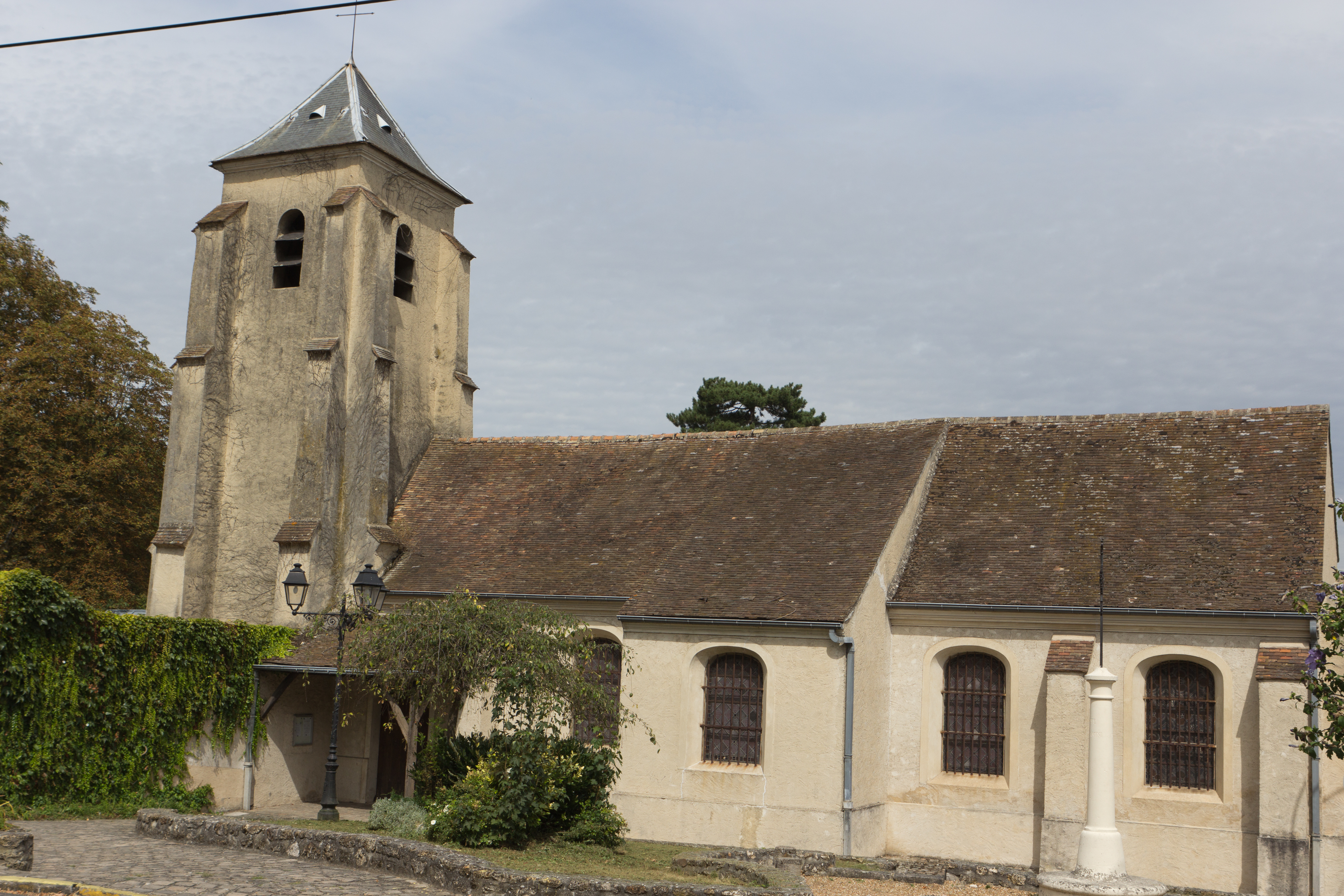 Eglise Saint-Laurent. Commune de Villemoisson-sur-Orge, département de l'Essonne. France